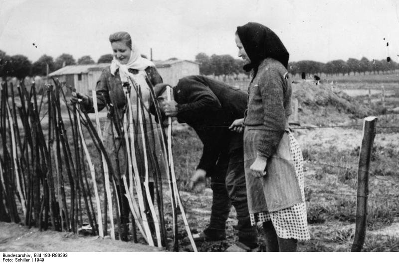 Neu-Rochlitz, Neubauerndorf, provosorische Zäune Illus/Schiller 1949 Neu-Bauerndorf Neu-Rochlitz Die Zäune aus Weidenruten um die provisorischen Häuser werden gesteckt. 3429-49